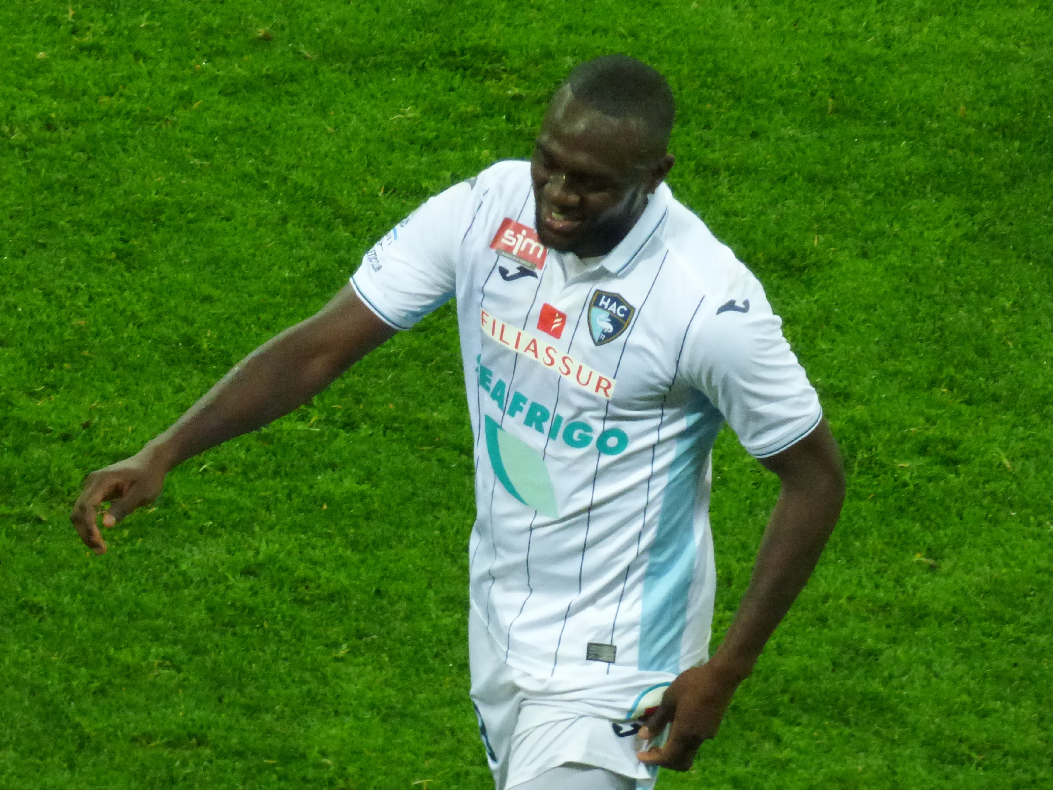 Amos Youga, après avoir reçu un carton rouge suite à une faute sur Yannick Gomis, pendant le match Lens / Le Havre, comptant pour la 30ème journée du championnat de France de Ligue 2 2018-2019, le 1er avril 2019 au Stade Bollaert-Delelis.